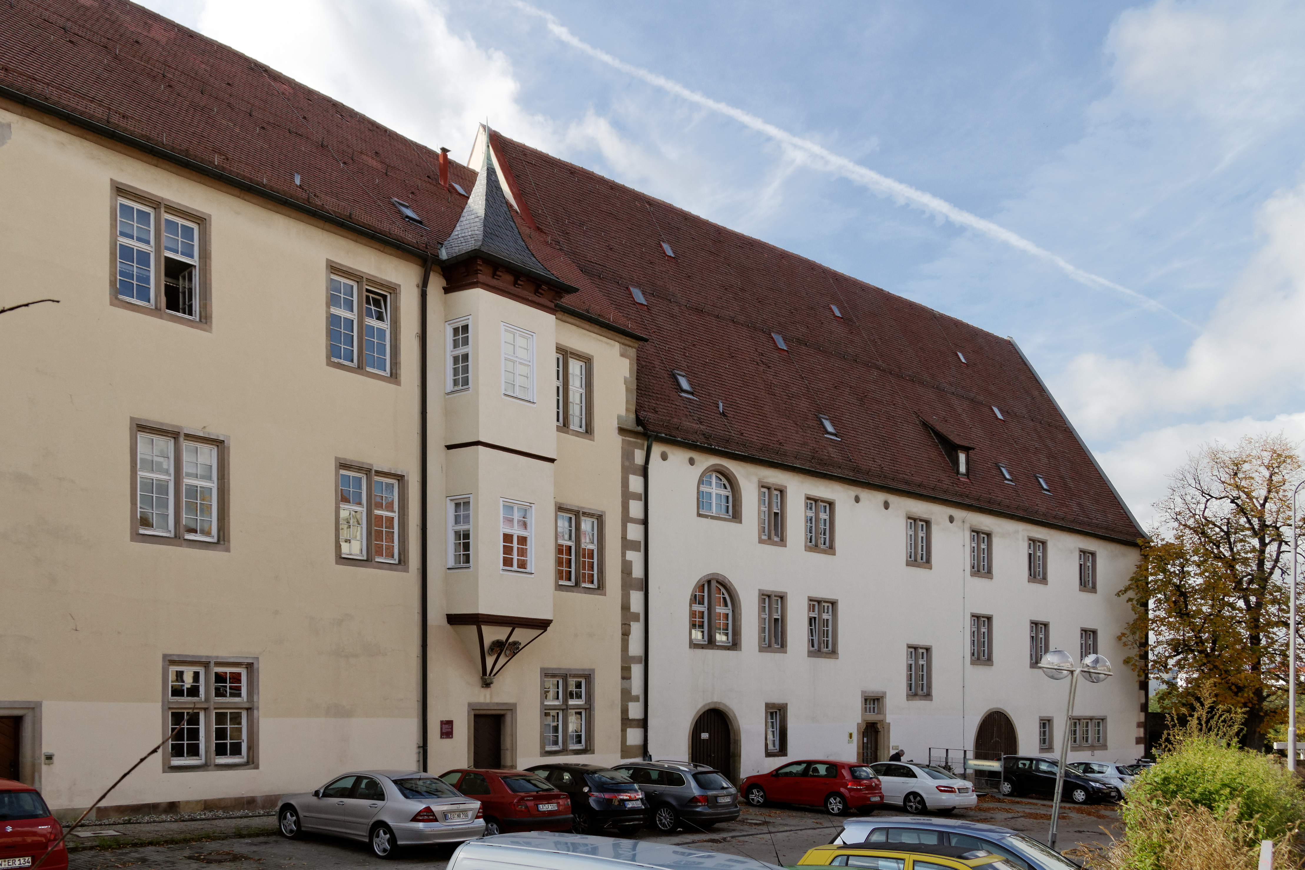 Schloss in Leonberg, Hofseite.